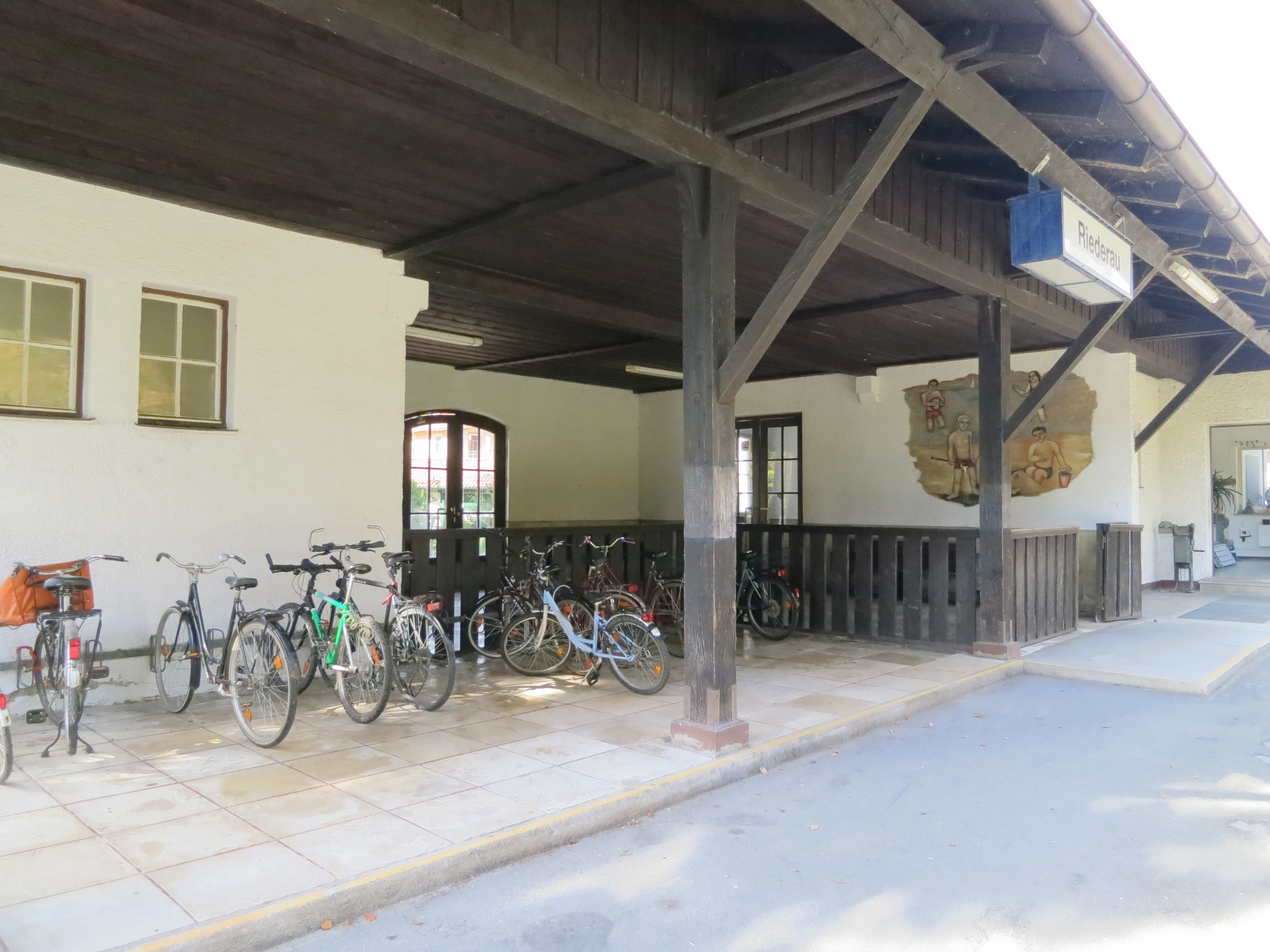 Offene Wartehalle des Bahnhofs Riederau an der Ammerseebahn mit ehemaliger Bahnsteigsperre